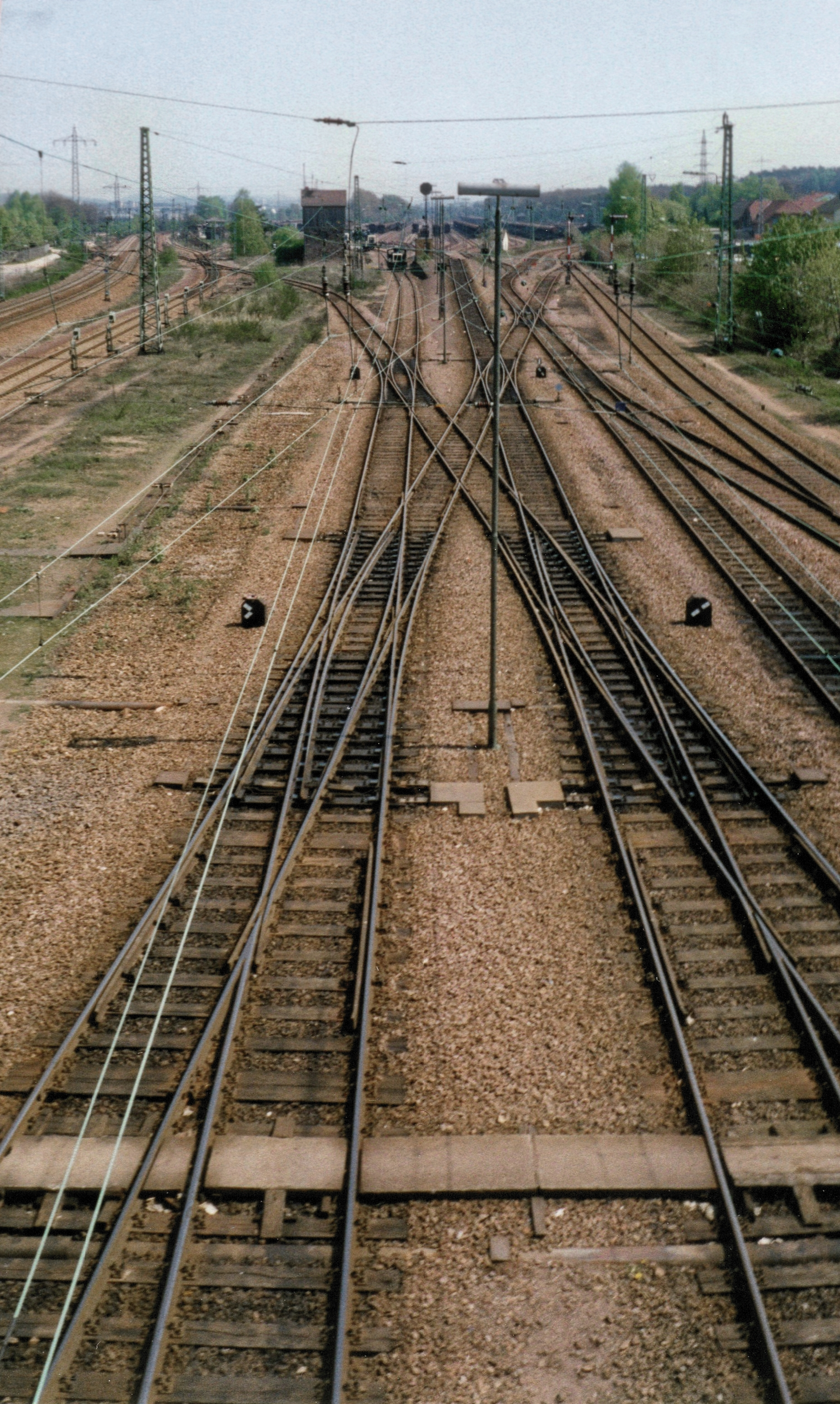 Rangierbahnhof Einsiedlerhof, Ansicht auf den Ablaufberg mit dahinter liegender Richtungsgruppe, Aufnahme ca. 1998